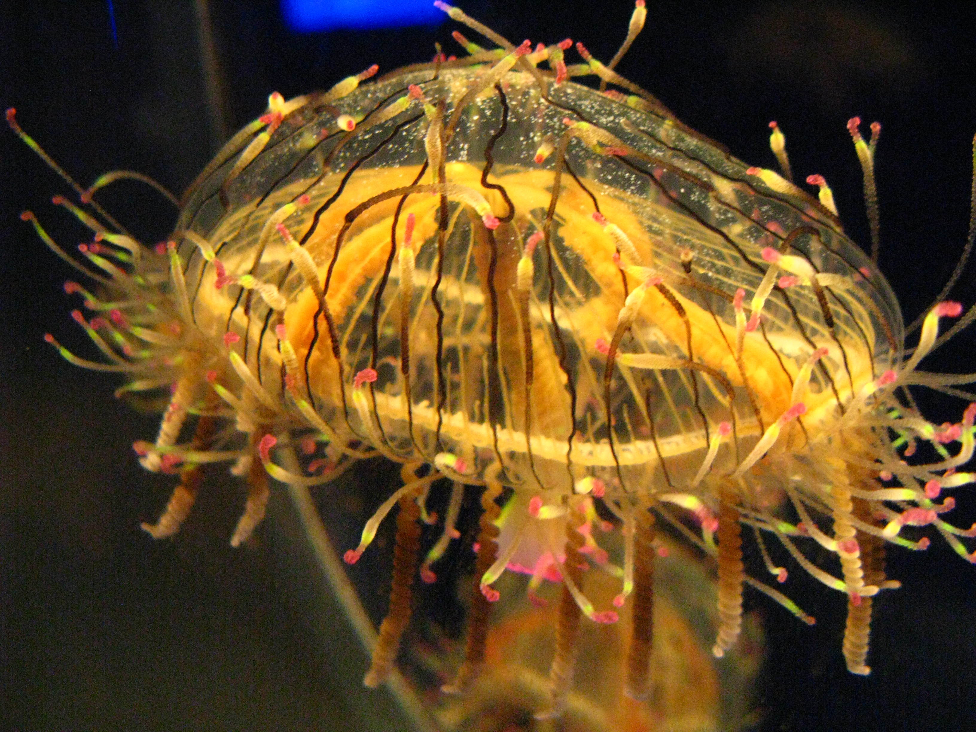 Scientific name Olindias formosa